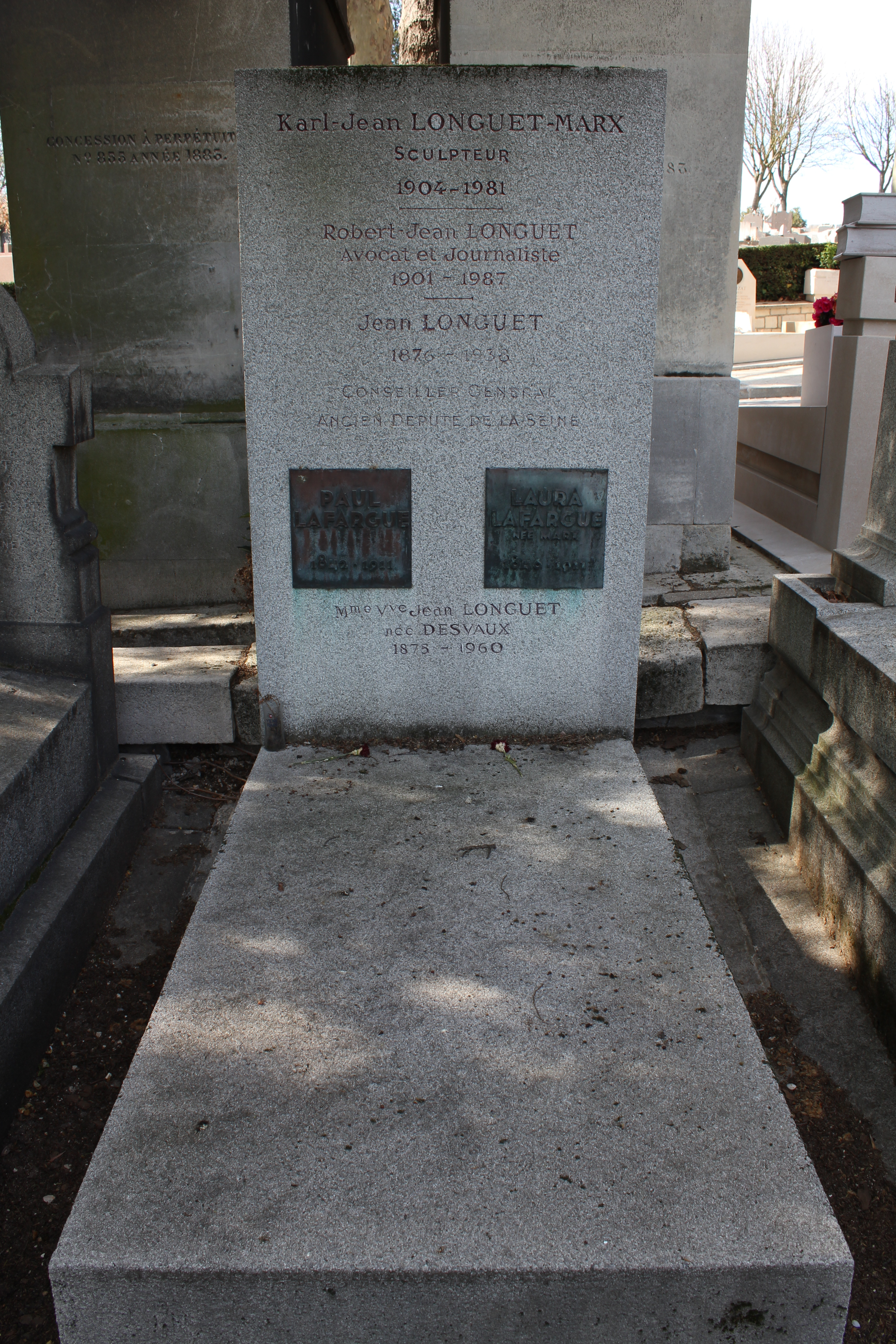 vue d'ensemble